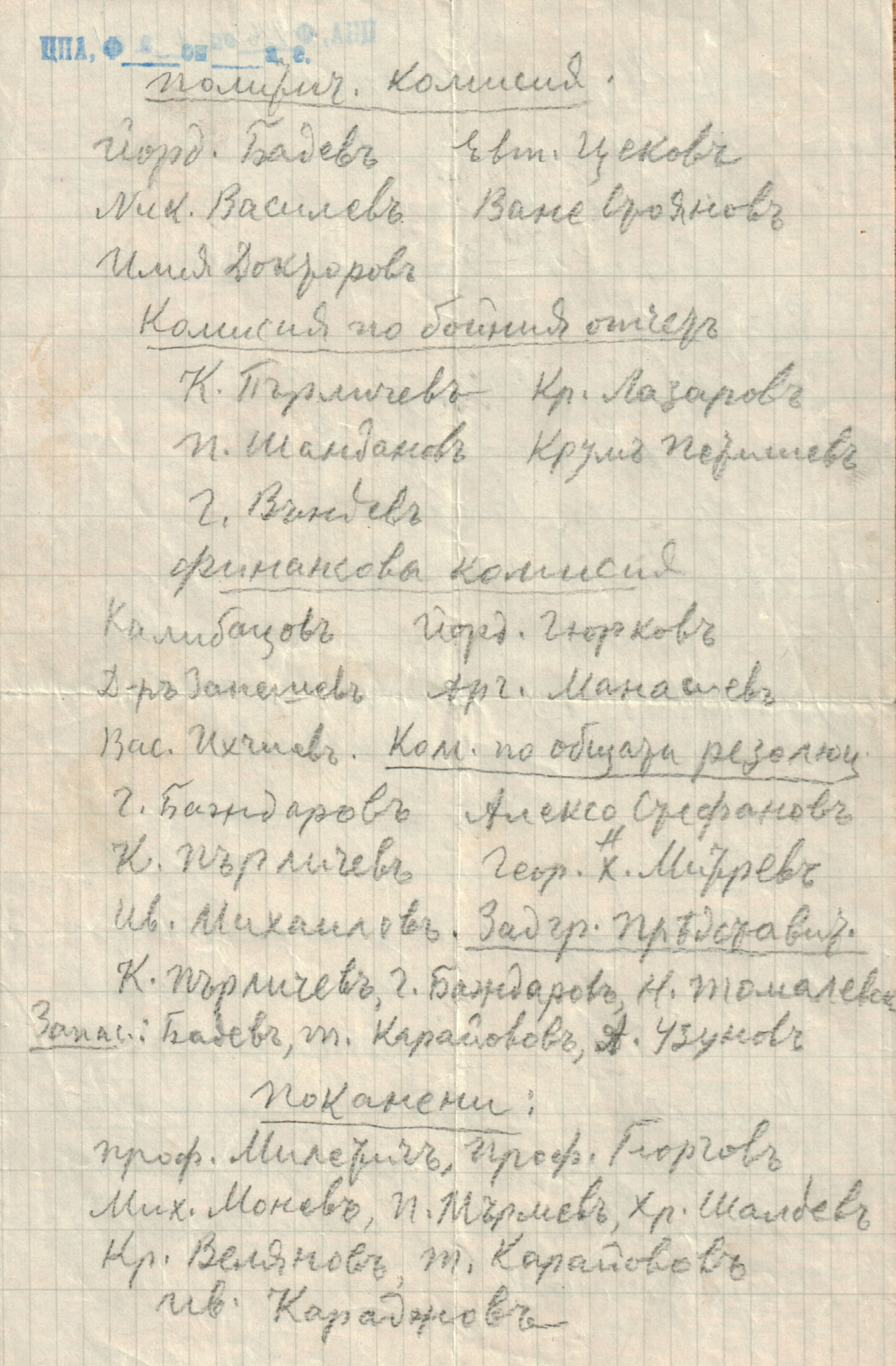 Протоколи, изложения и бележки на и за общите конгреси на ВМРО.